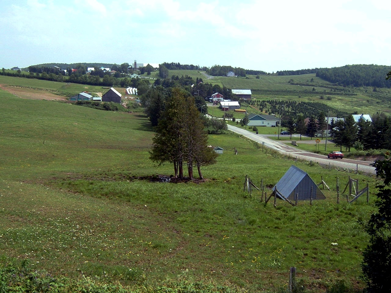 Vue du Village de Packington au Témiscouata, Québec, Canada